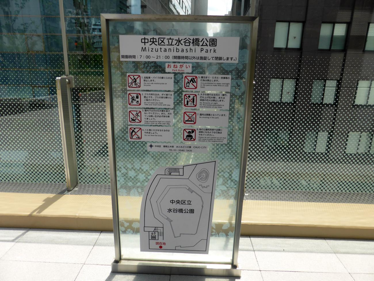 水谷橋公園開園時間